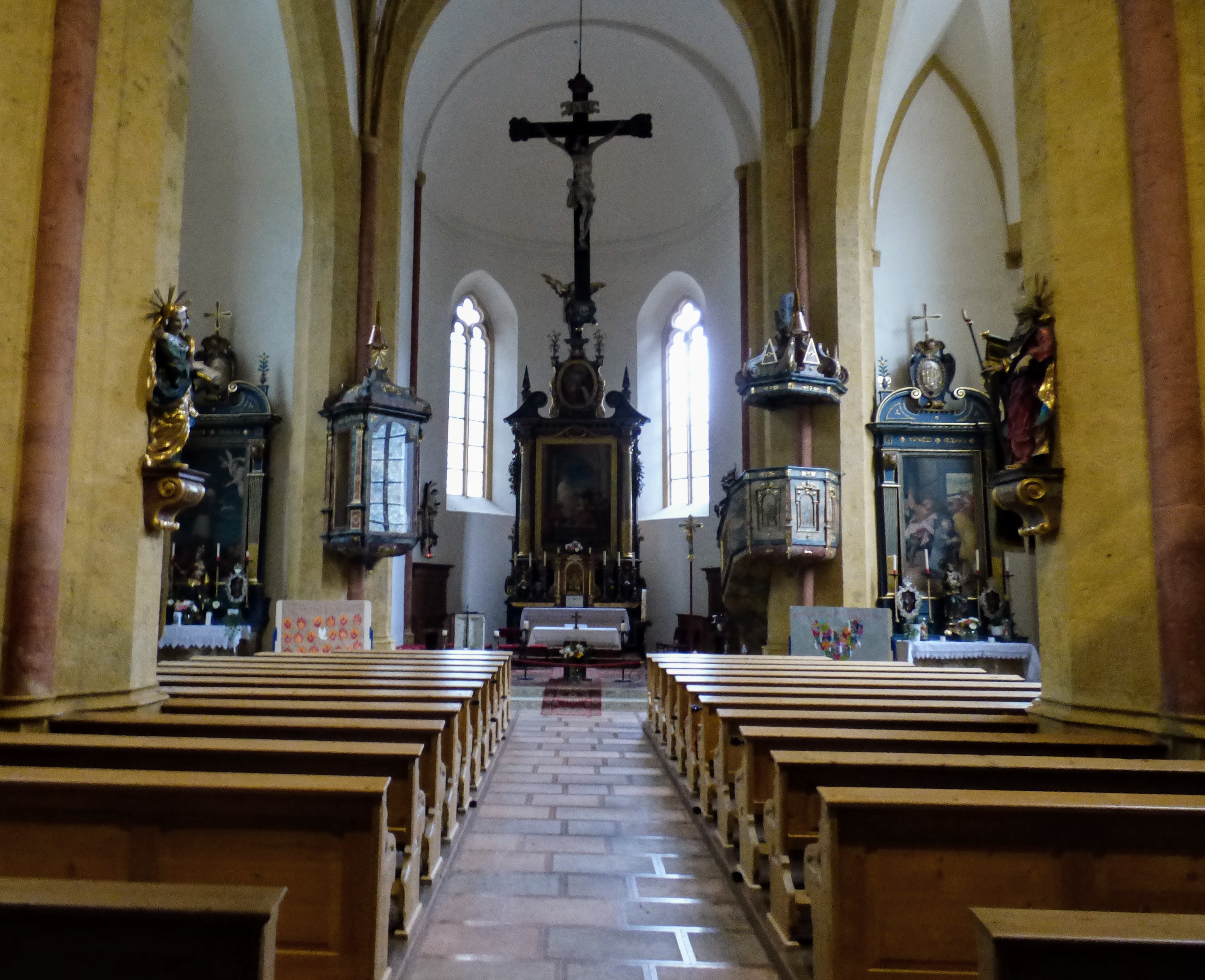 Inneres der Pfarrkirche Hüttau